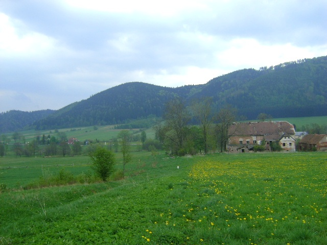 Obniżenie śródgórskie w Sudetach Środkowych w południowo-zachodniej Polsce w województwie dolnośląskim.